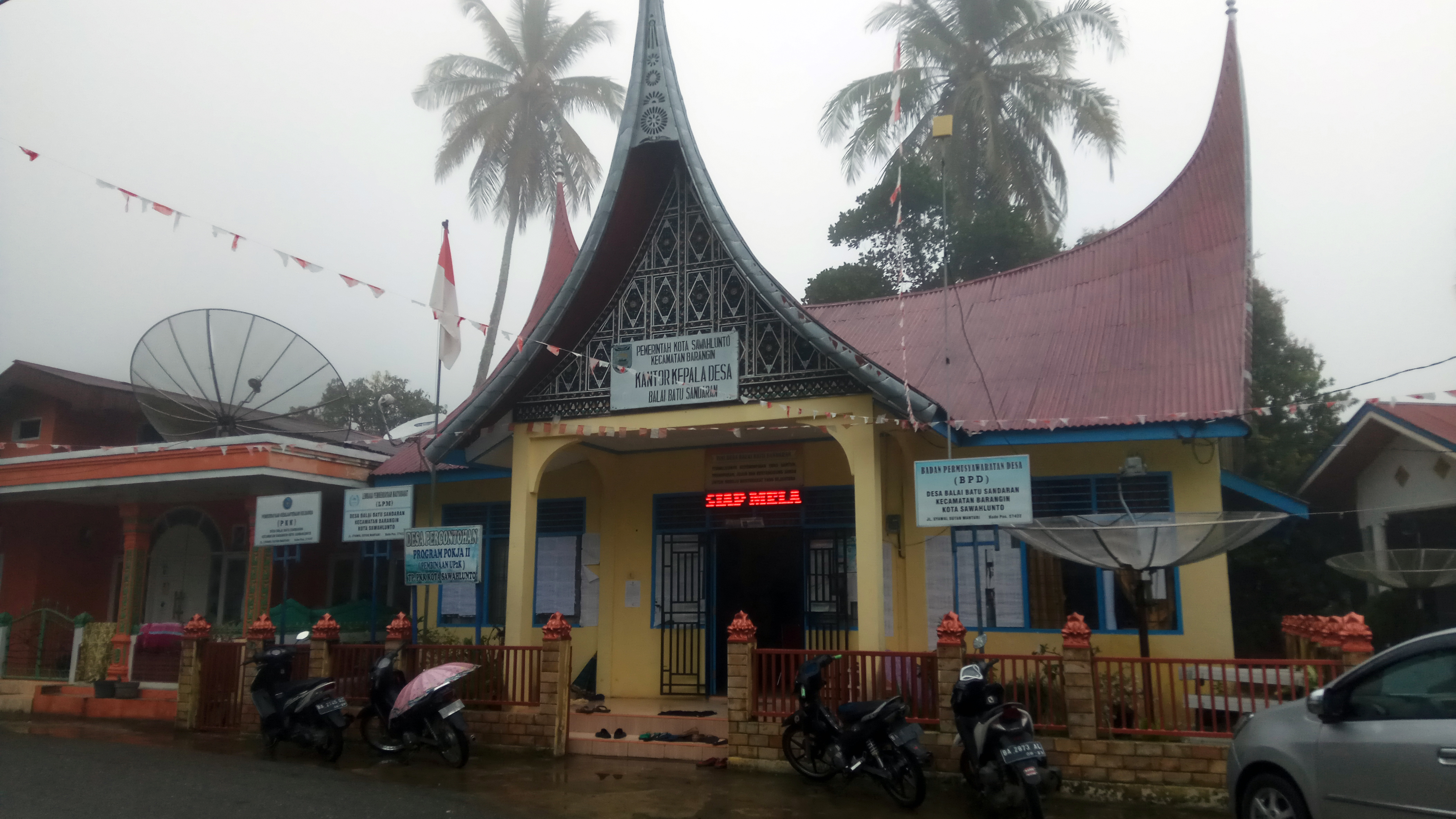 Kantor Kepala Desa Balai Batu Sandaran, Kecamatan Barangin, Kota Sawahlunto.